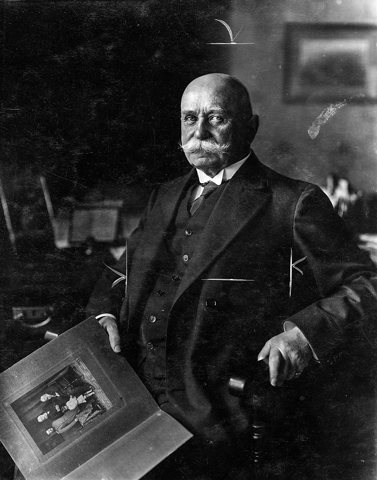 Ferdinand Graf von Zeppelin (1838-1917). Halbporträt sitzend, mit einem Familienfoto in der rechten Hand. Fotografie von Theodor Hilsdorf, München um 1915. Vintage print mit Ausschnitt-Kennzeichnung und Atelieraufdruck verso. Silbergelatine chamoise halbmatt, Karton; 21,3 x 17,2 cm